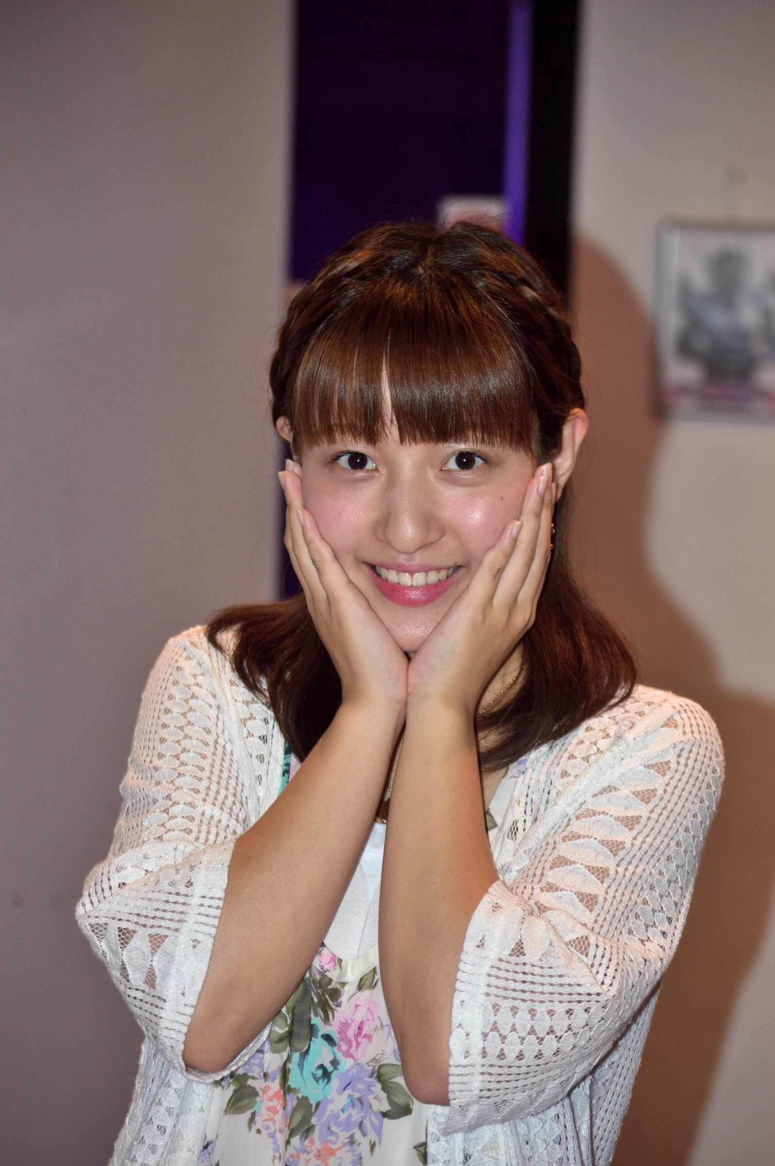 Happy Friday Pocket Vol.4＠天神ポケット